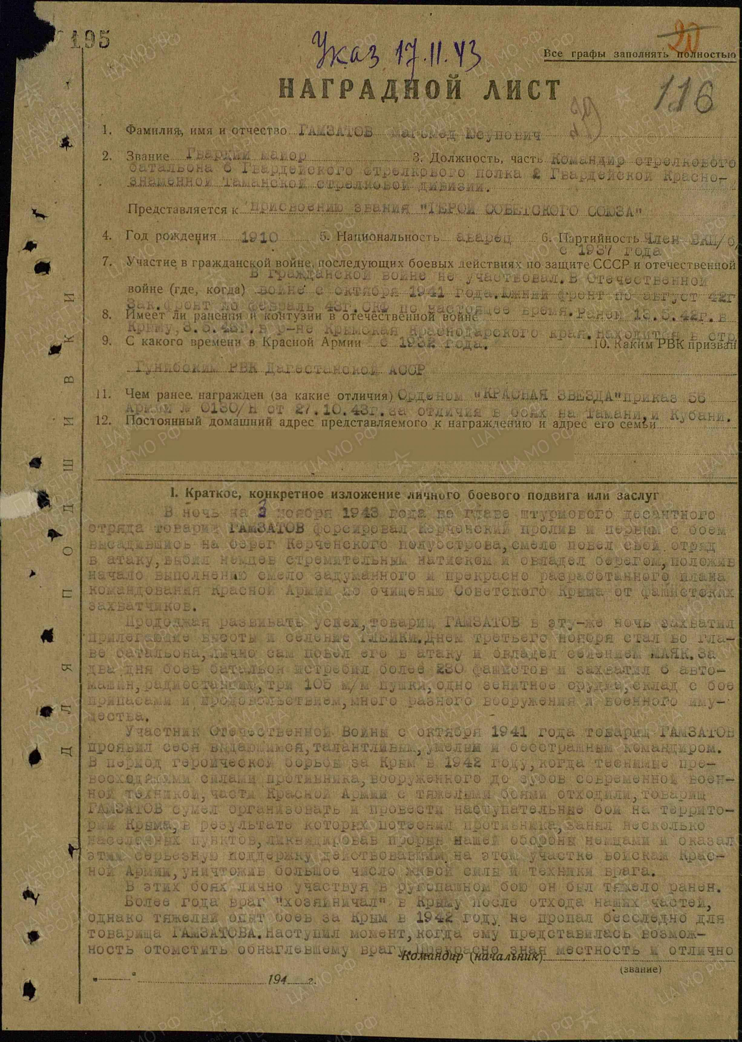 Наградной лист Героя Советского союза - Гамзатова Магомеда Юсуповича